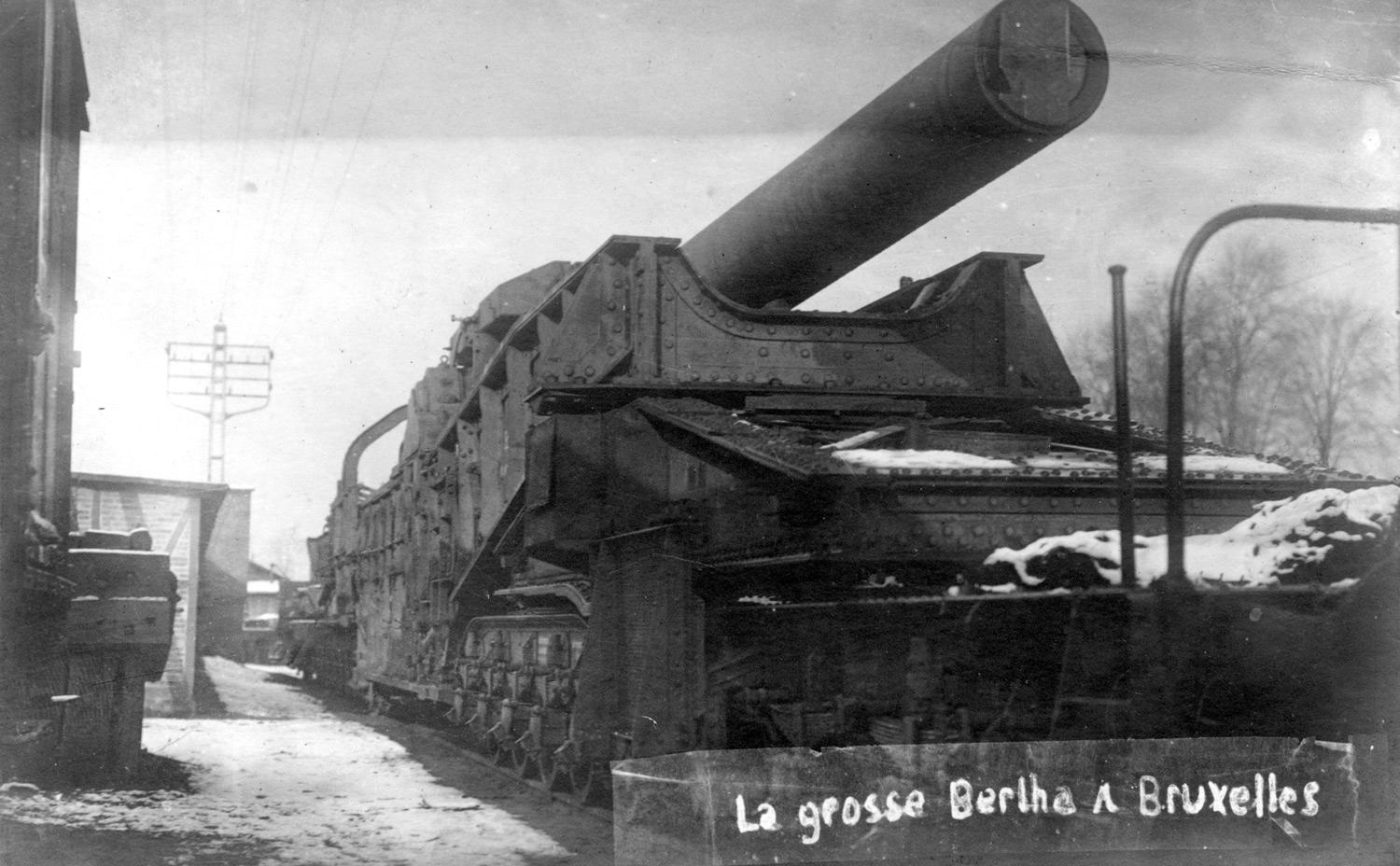 Dikke Bertha, Brussel